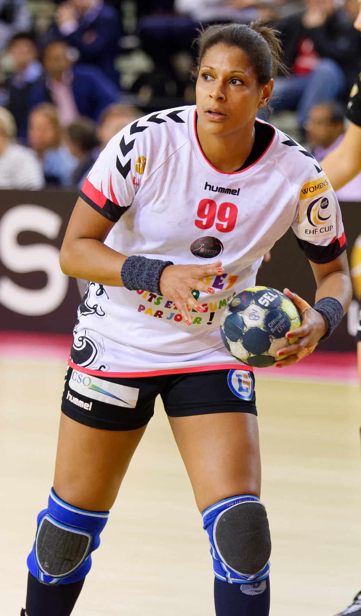 Rencontre de demie-finale retour de championnat entre Issy Paris et Brest. A Issy les Moulineaux, le 19 mai 2017.